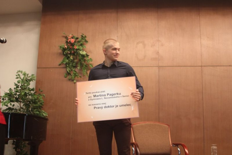 esej Jana Johanidesa 2014